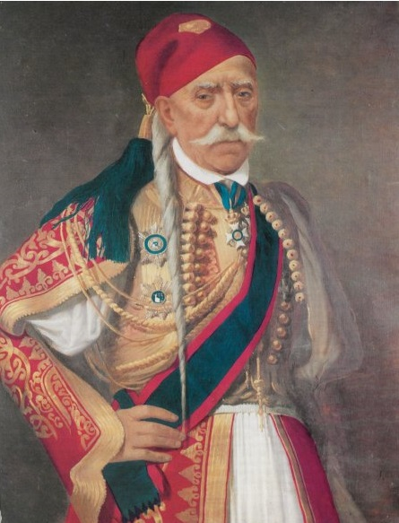 Dimitris Plapoutas (1786–1865)